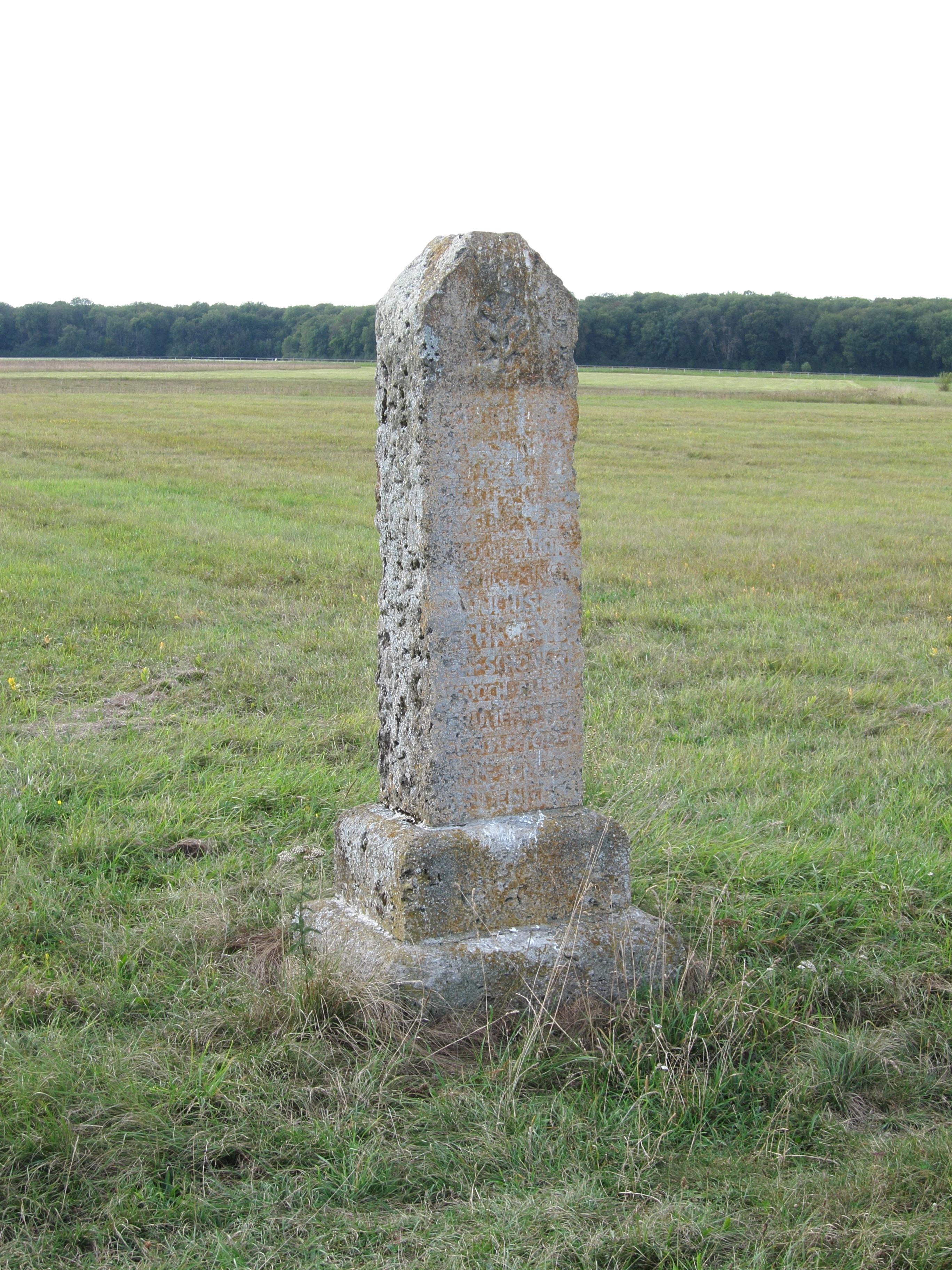 Gedenkstein in der Garchinger Heide zur Erinnerung an einen Jagdunfall. Die Inschrift lautet: Am 31. Oktober 1908 ereilte hier nach flotter Fahrt hinter der Meute den königlich bayerischen Oberstleutnant im Kriegsministerium Julius Freiherrn von Eyb ein schöner jedoch allzufrüher Reitertod. Ehre seinem Andenken.